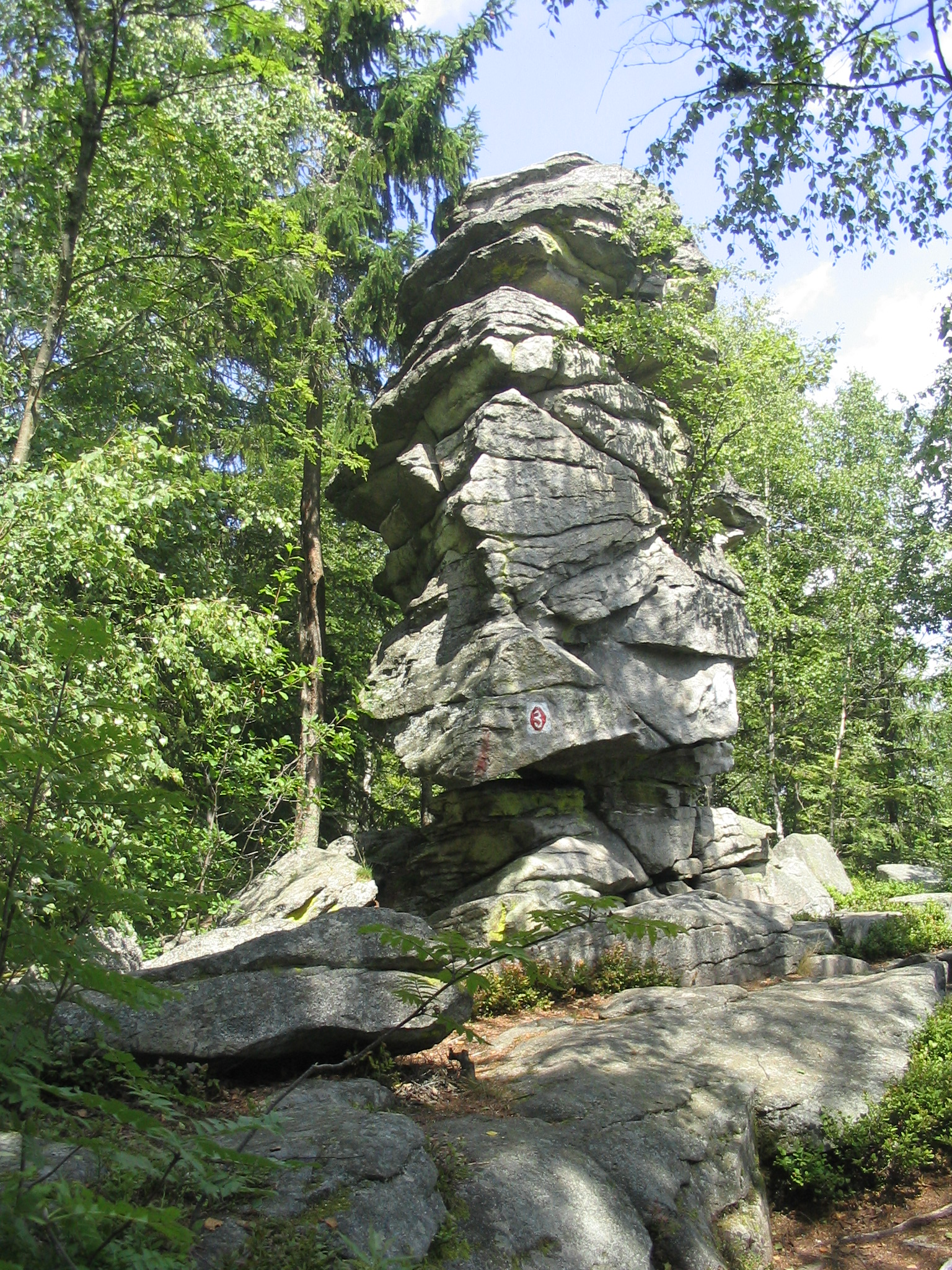 Bischofsmais, Teufelstisch, aufgenommen am 26.07.2007 von Dr. Hagen Graebner